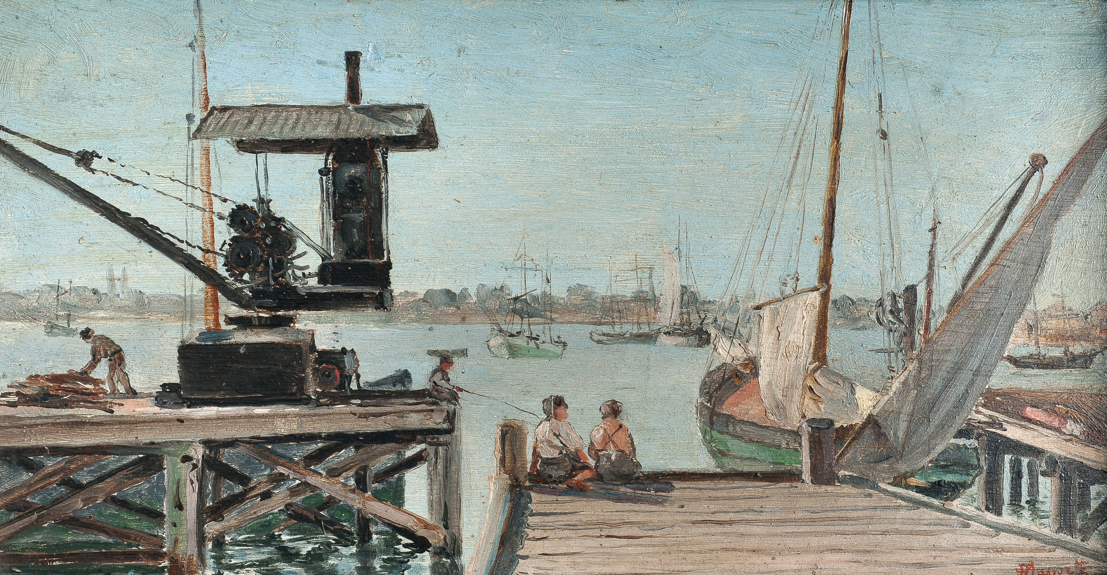 Obra "Antiguo puerto de Montevideo" del pintor uruguayo Domingo Laporte (1855-1928) Óleo sobre tabla de 18 cm de alto x 34 cm de ancho. Fotografía de la obra tomada por Carly Angensheidt.